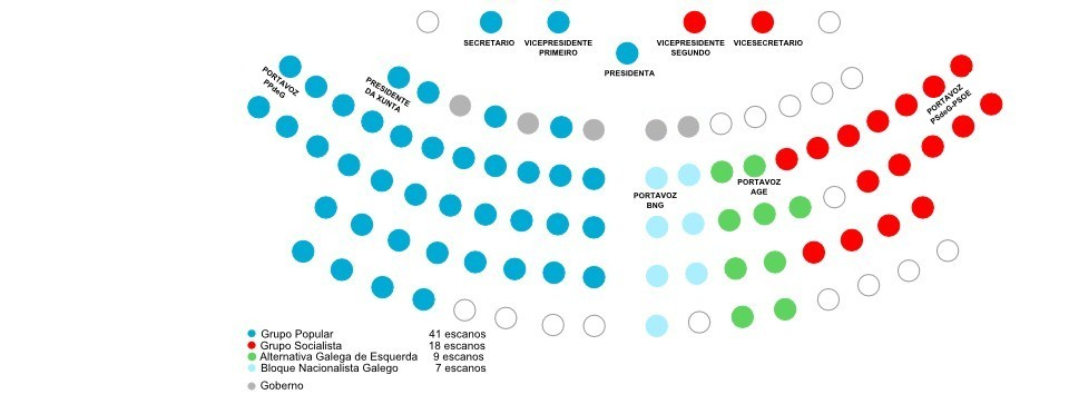 Distribución de escaños en el Parlamento de Galicia